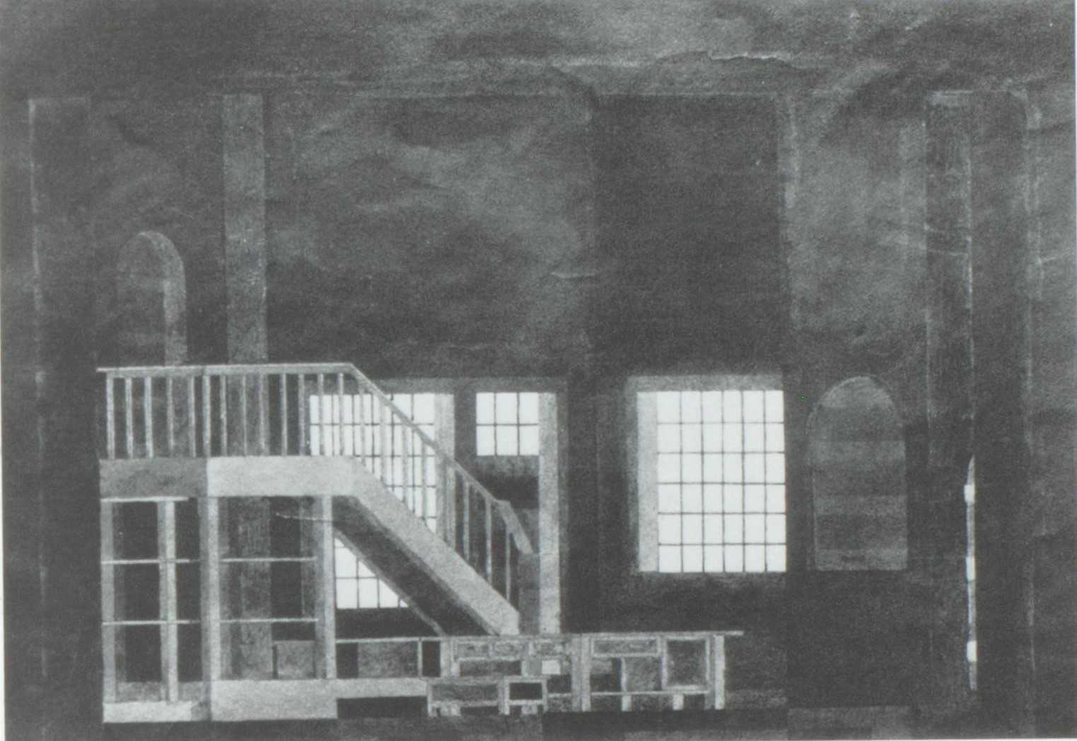 Ewald Dülberg Bühnenbildentwurf zu Paul Hindemith Cardillac 2. Akt Krolloper 1928